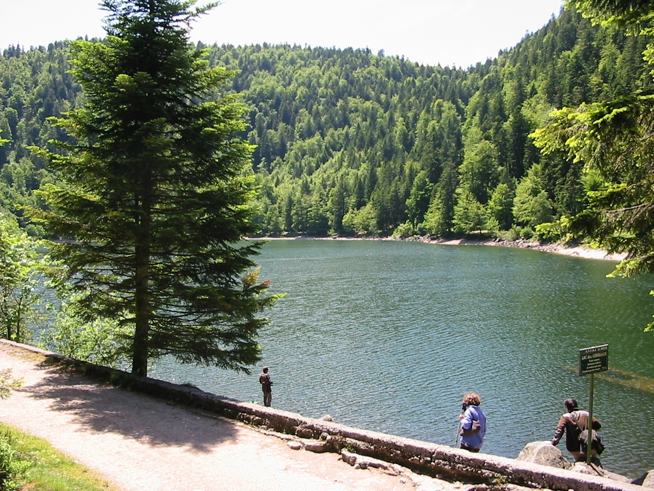 Le lac des Corbeaux à La Bresse (Vosges)